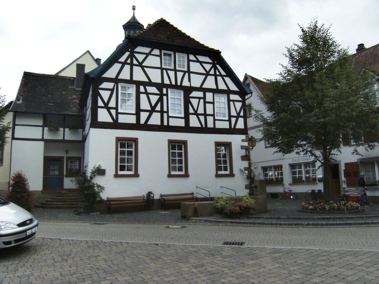 Marktplatz 7: barockes Eckwohnhaus, heute Kahnweilerhaus; teilweise Fachwerk, Krüppelwalmdach, 18. Jahrhundert; straßenbildprägend